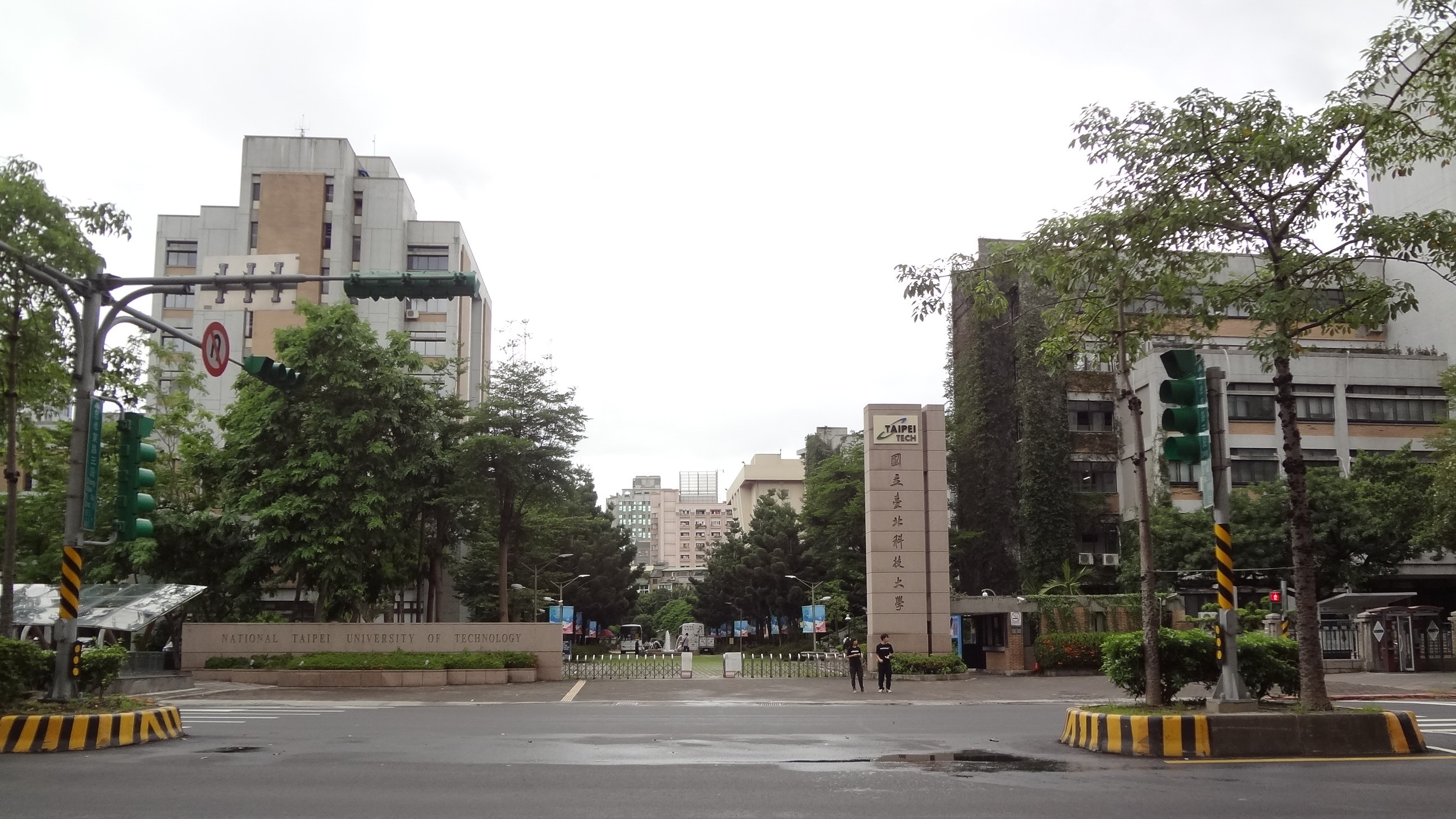 中文（台灣）: 國立臺北科技大學大門，位於臺北市大安區忠孝東路三段1號。